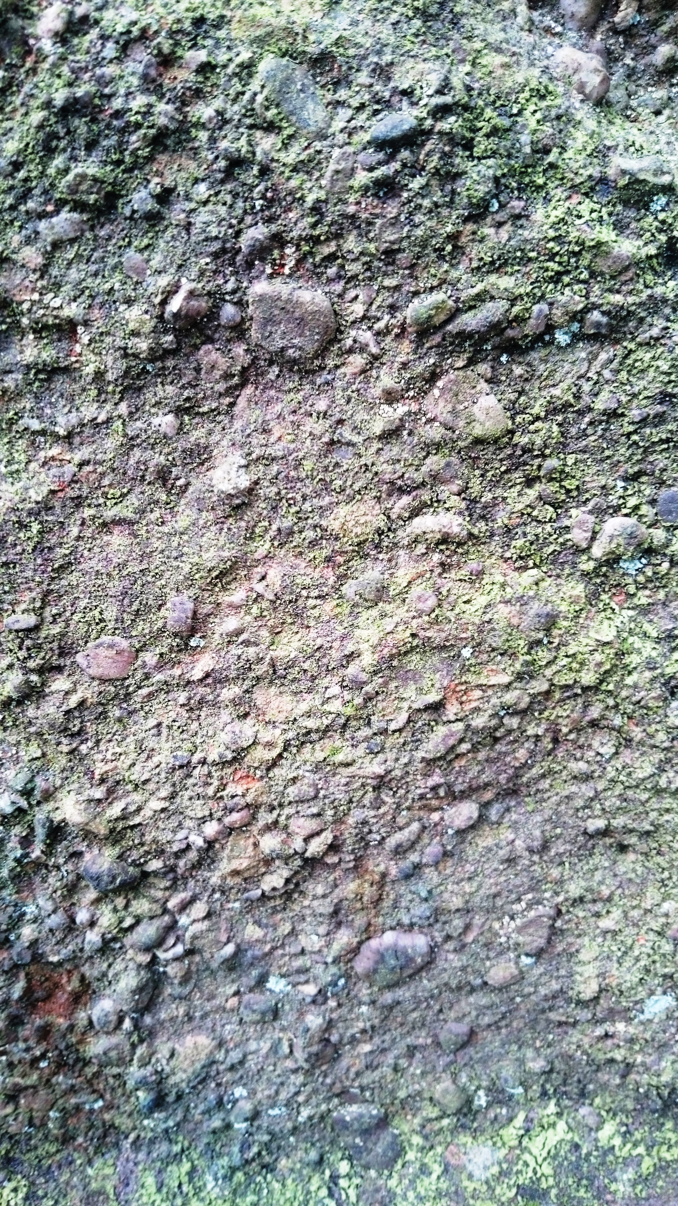 Naturdenkmal Kluckensteine